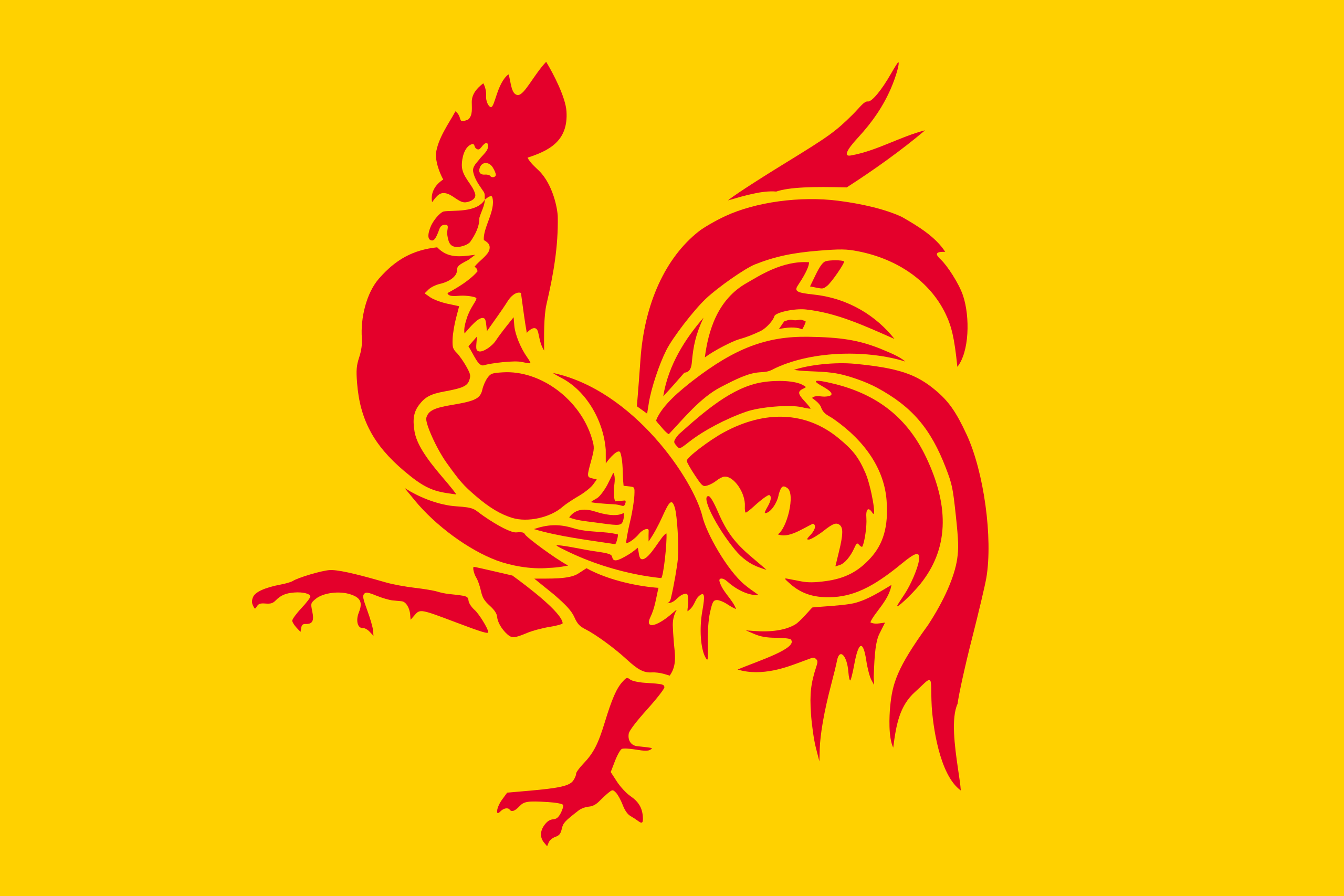 Drapeau officiel de la Région wallonne, tel qu'adopté par le décret du 23 juillet 1998.